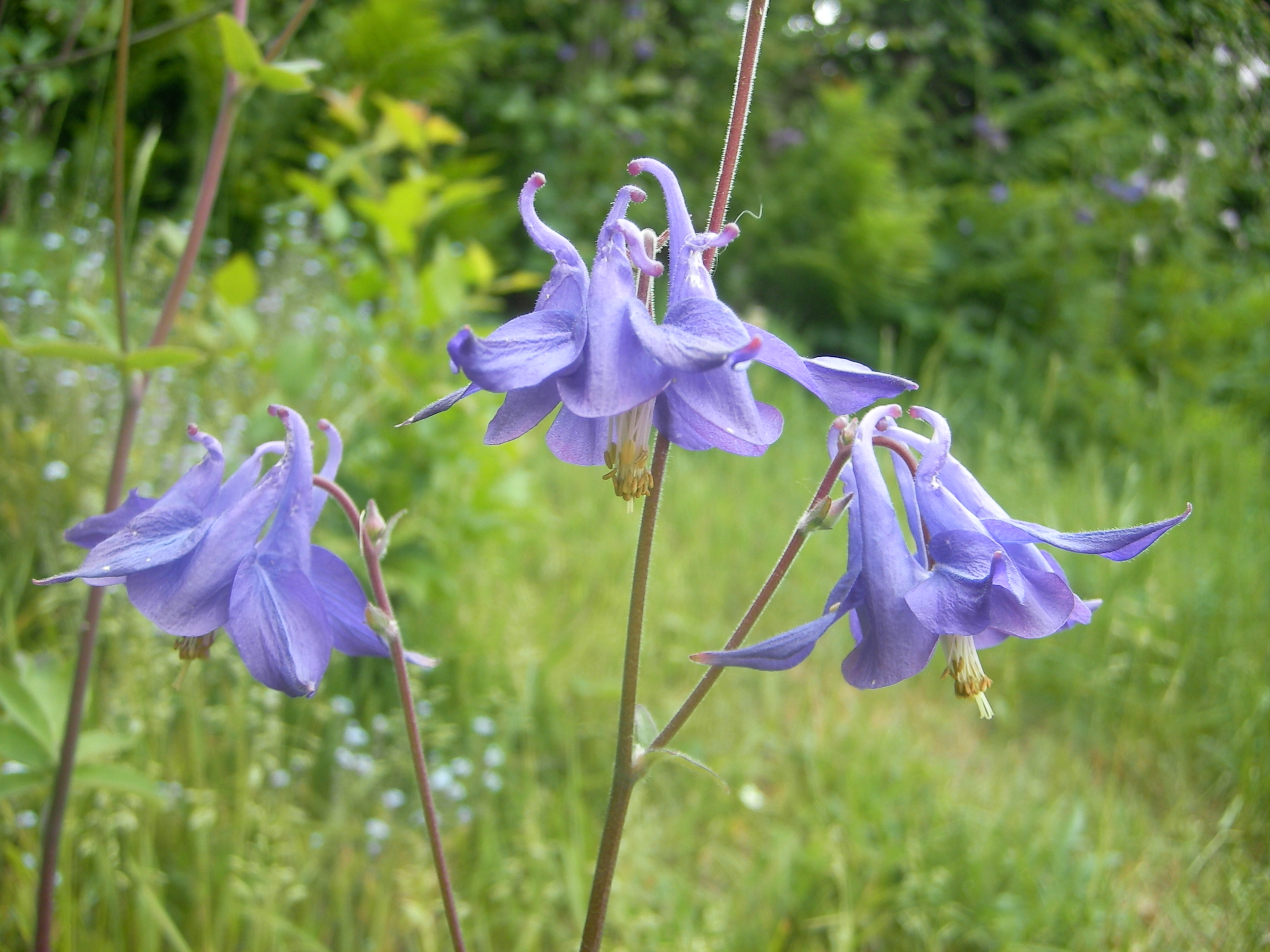 Aquilegia vulgaris